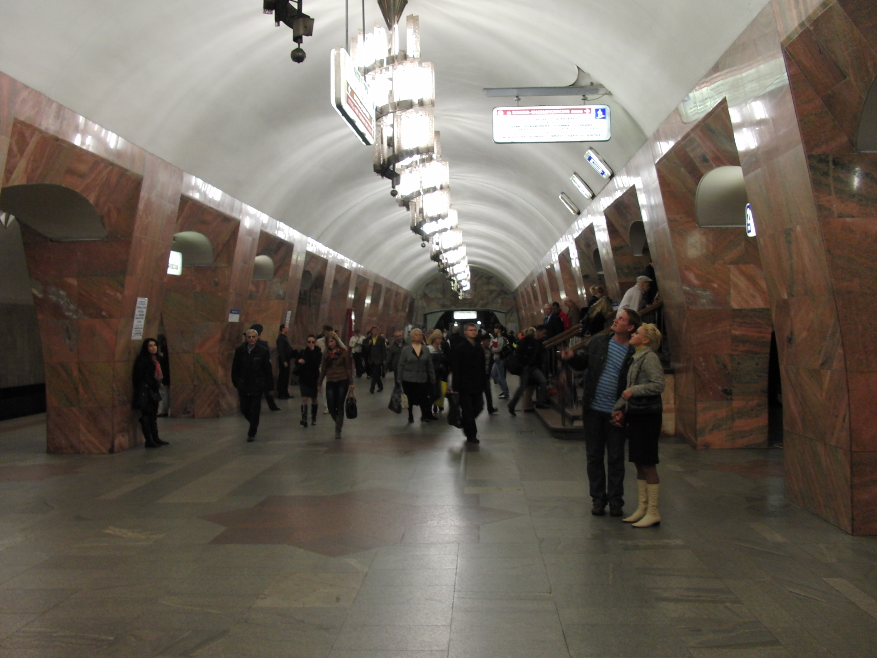 Marksistskaya (Марксистская)